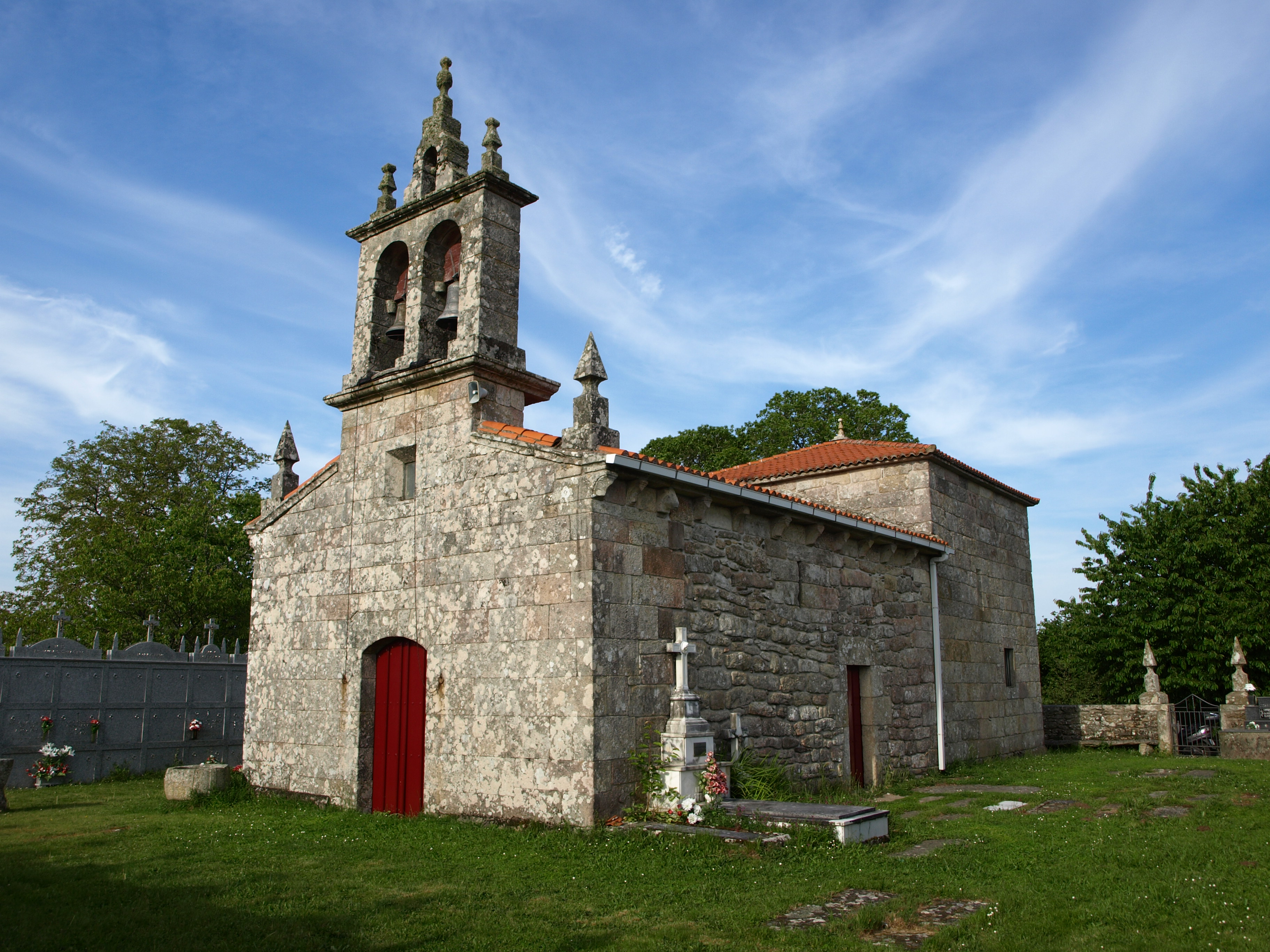 Igrexa parroquial de A Cervela (Antas de Ulla)